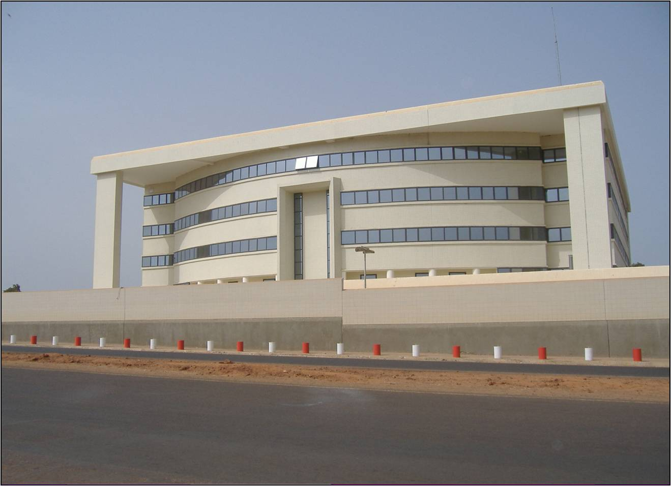 Националната банка в Бисау.